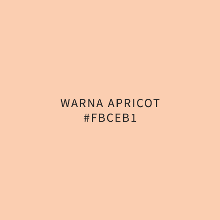 warna aprikot beserta kode html sumber